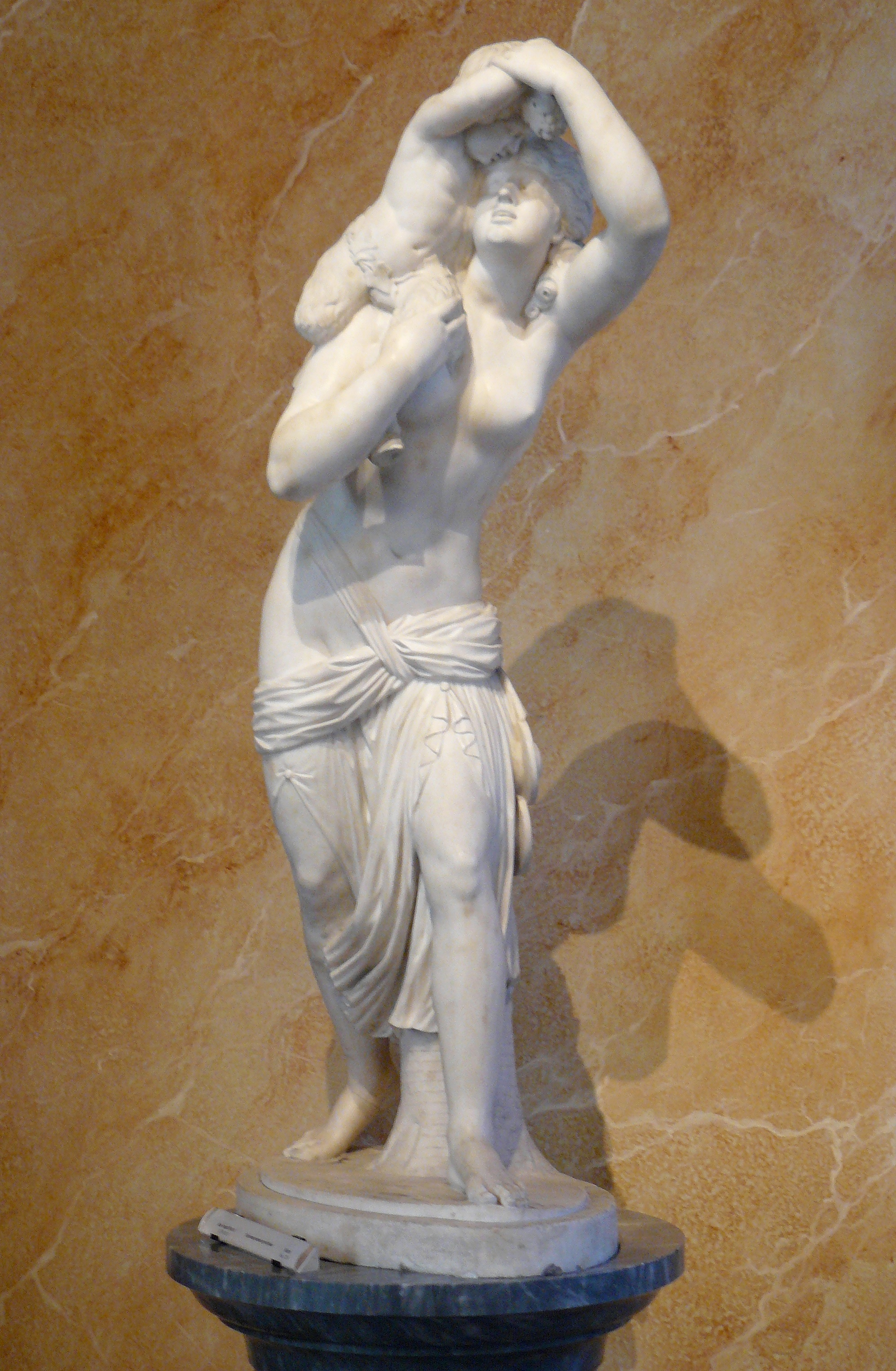 Jean Joseph Foucou (1739-1815), Bacchante portant un petit faune, marbre, musée Cognac-Jay n° inv. J219 (hauteur environ 1,60 m).